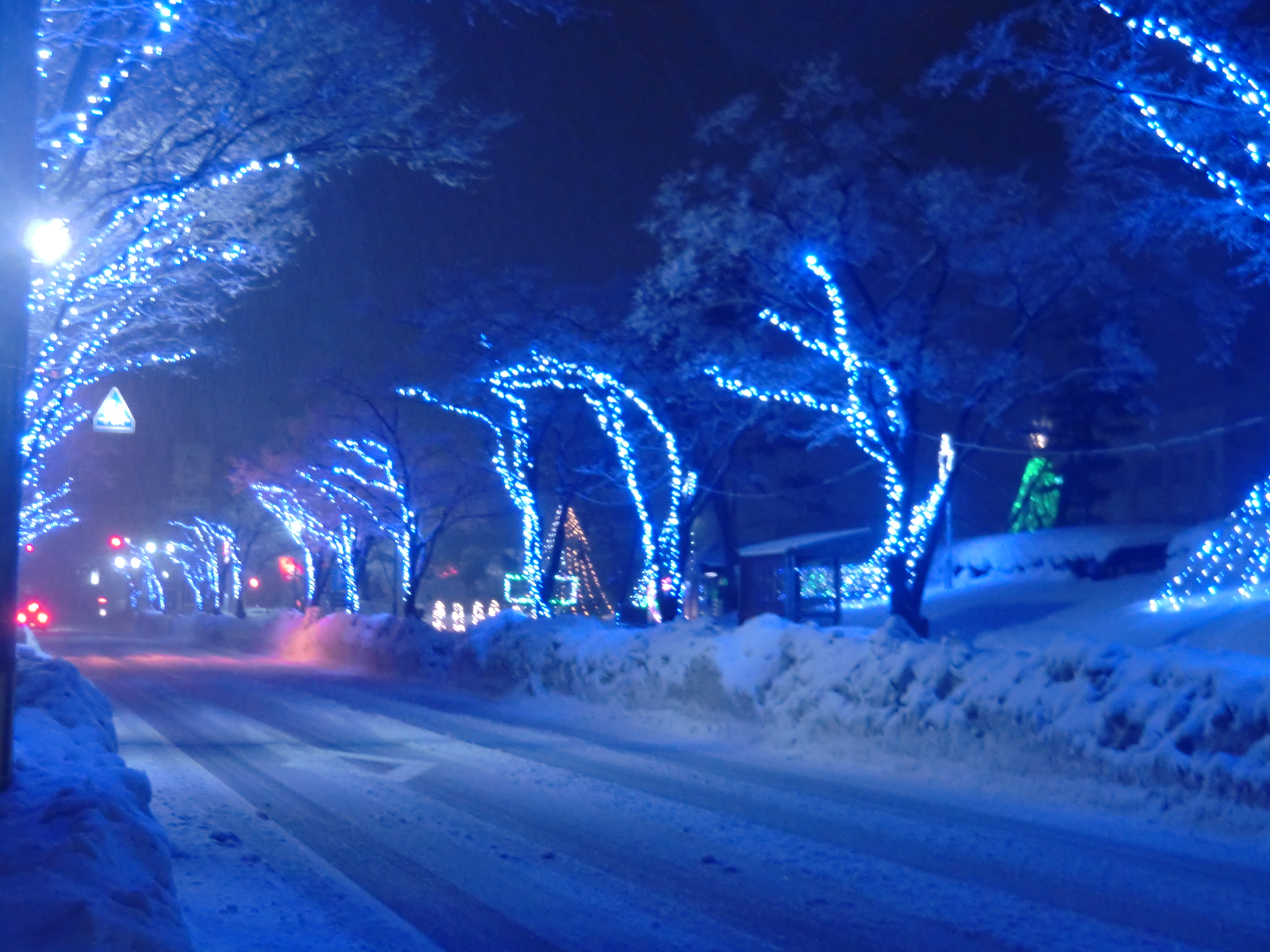 冬の期間、点灯されるイルミネーションです。